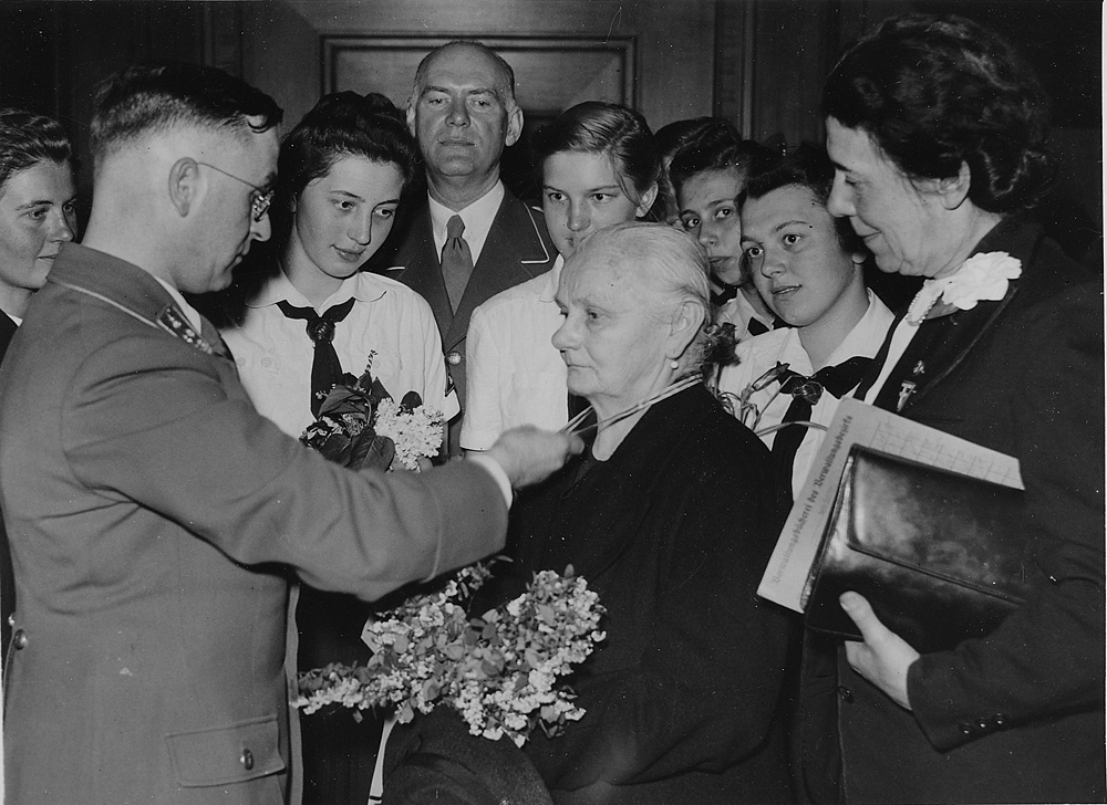 Beskrivelse: Morsdag 1943. Foto antakelig fra Tyskland. Utdeling av æreskors til en mor med mange barn ved en høytidelighet i partiet, et uttrykk for takk og samhørighet med mødrene hvis sønner eller menn ga sitt liv for Tyskland. Fotograf: Reichskommissariat für die besetzten norwegischen Gebiete Arkivreferanse: RIKSARKIVET- RAFA3309_23_3. Original billedtekst: "Am Muttertag 1943 wurde in der üblichen Art in Feierstunden der Partei Ehrenkreuze für kinderreiche Mütter verliehen, als Äusserung des Dankes und der treuen Verbundenheit vor allen auch für jene Mütter, deren Söhne oder Männer ihr leben für Deutschlands Bestehen liessen. Unser Bild zeigt verleihung des Ehrenkreutzes durch den Beauftragten der Partei." Mother’s Day 1943. Photo probably from Germany. Awarding of honorary cross to a mother with many children at a party ceremony: an expression of gratitude and solidarity with the mothers whose sons or men gave their lives for Germany. Archival reference: RAFA3309_23_3.